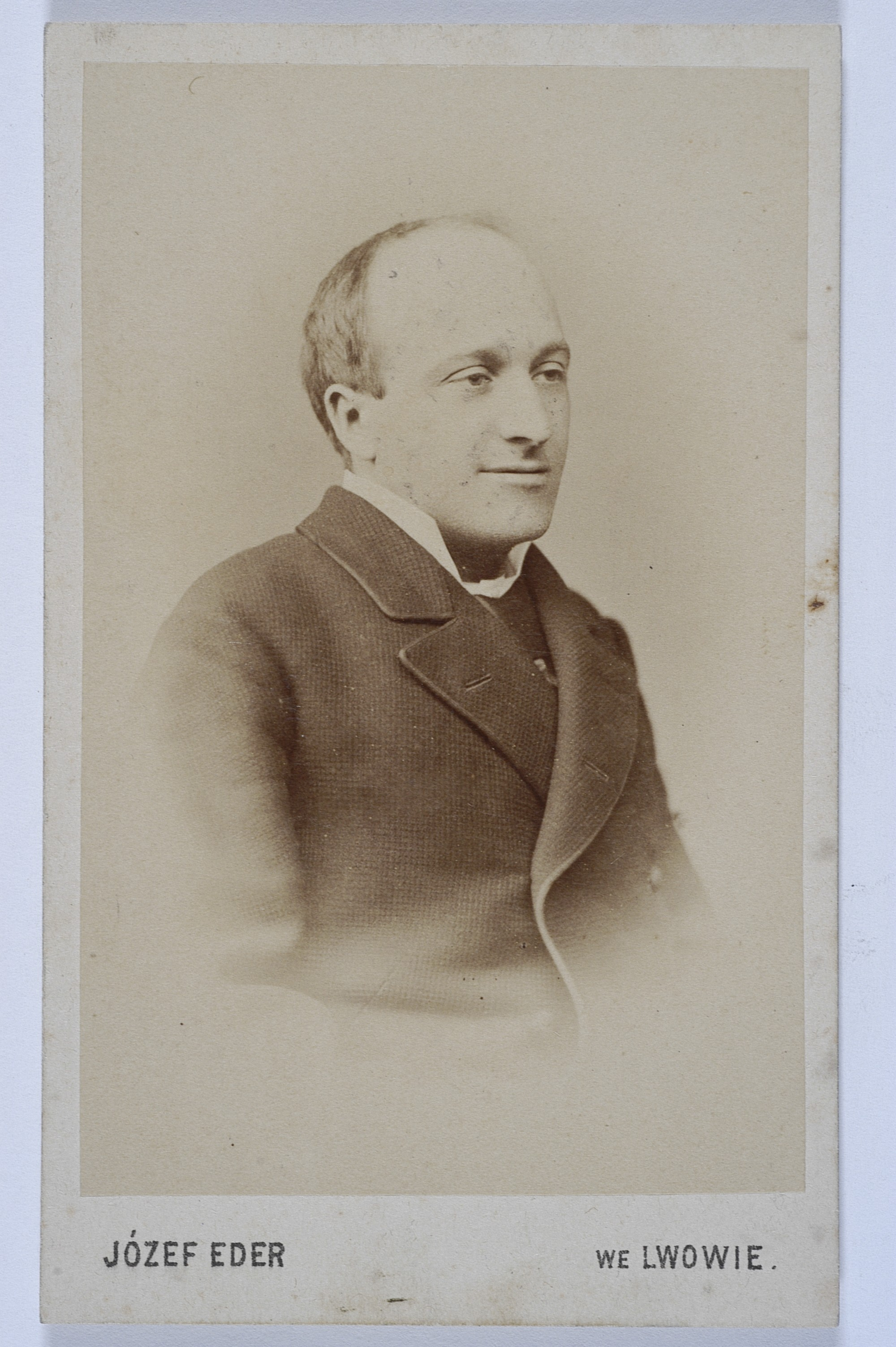 Aleksander Podwyszyński, 1877 r.